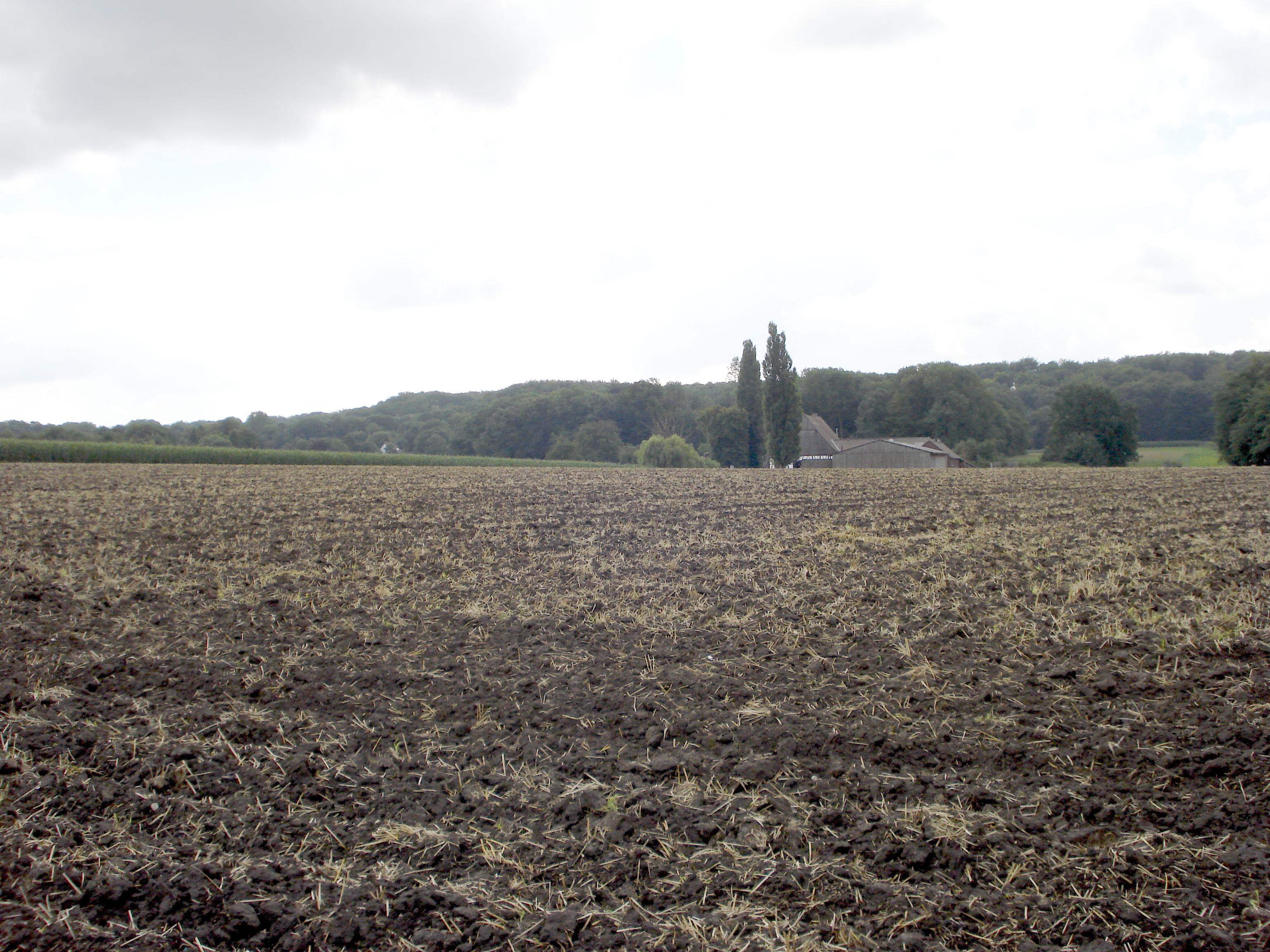 Hügellandschaft, naturräumliche Haupteinheit Westenhellweg, Herne, bei Altenhöfen, Landschaftsschutzgebiet (LSG-4409-015), der Blick geht Richtung Herner Mark, im Hintergrund: Düngelbruchwäldchen und „Constantiner Busch“